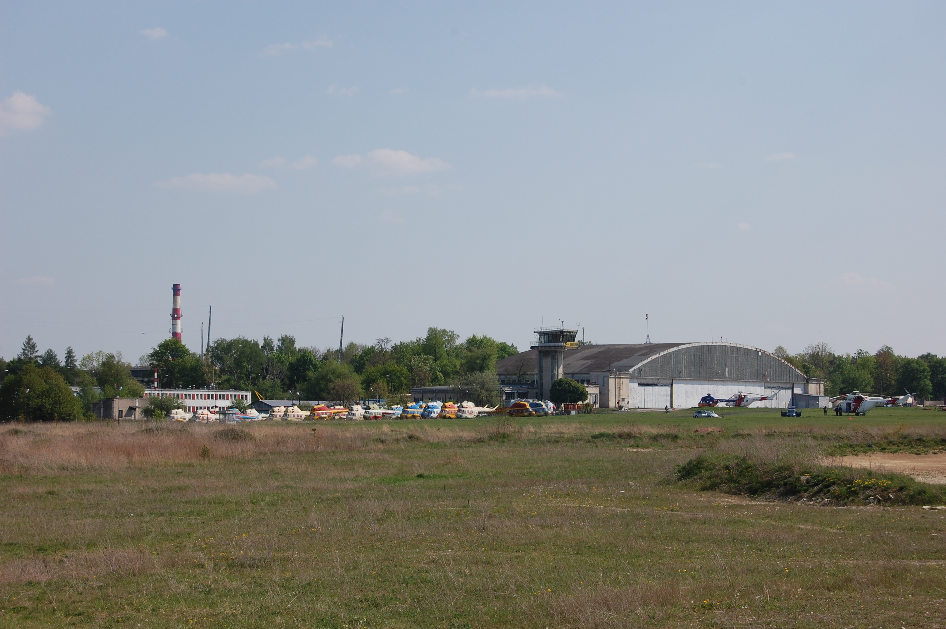 Lotnisko Świdnik (kod ICAO: EPSW)